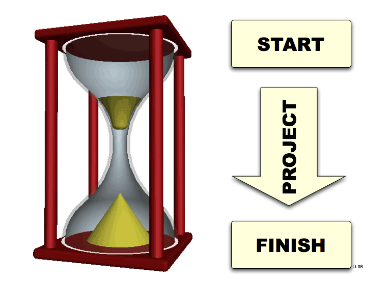 Artistieke weergave van een project. Laurens van Lieshout Januari 2006.